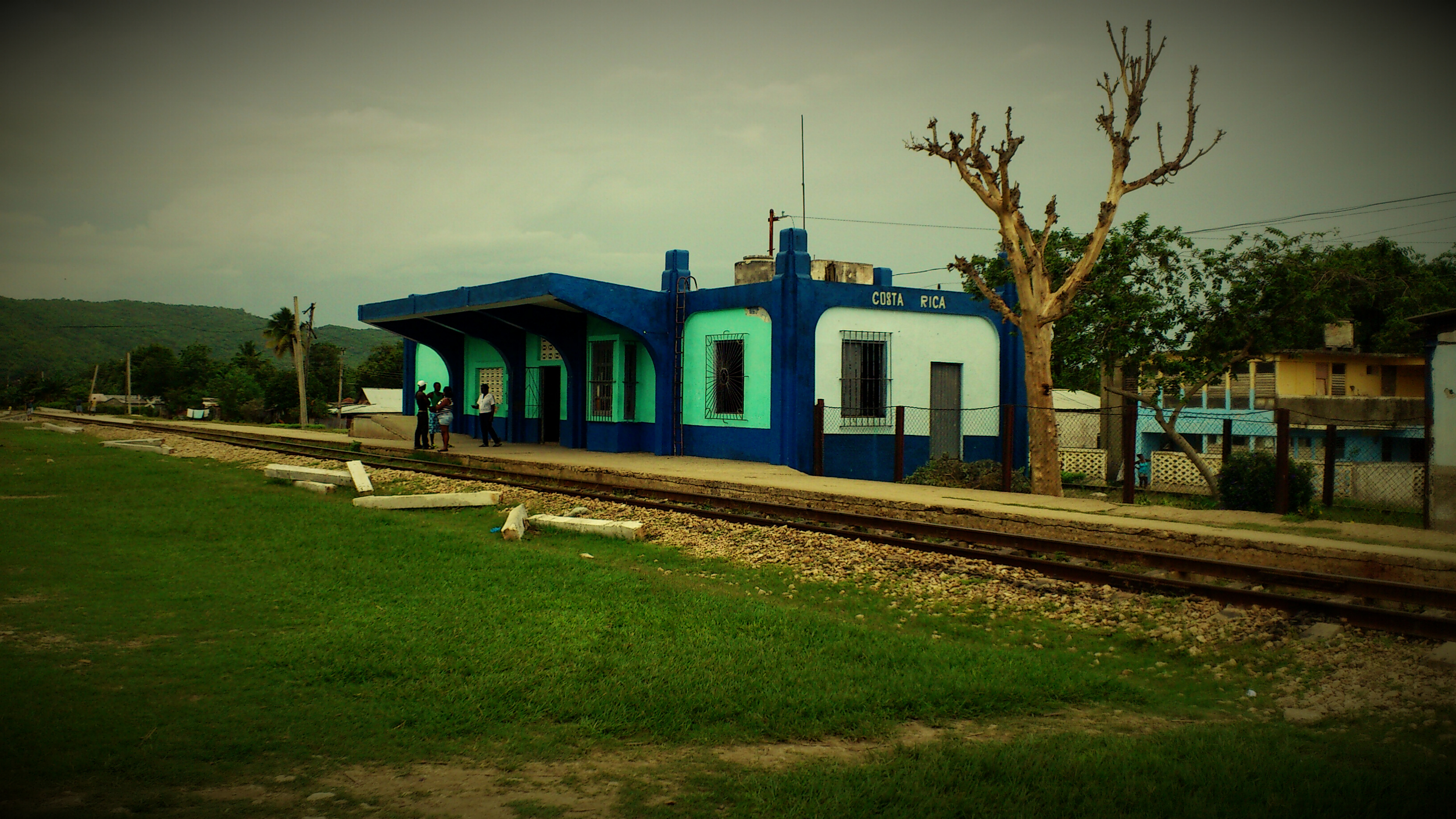 Costa Rica, Cuba